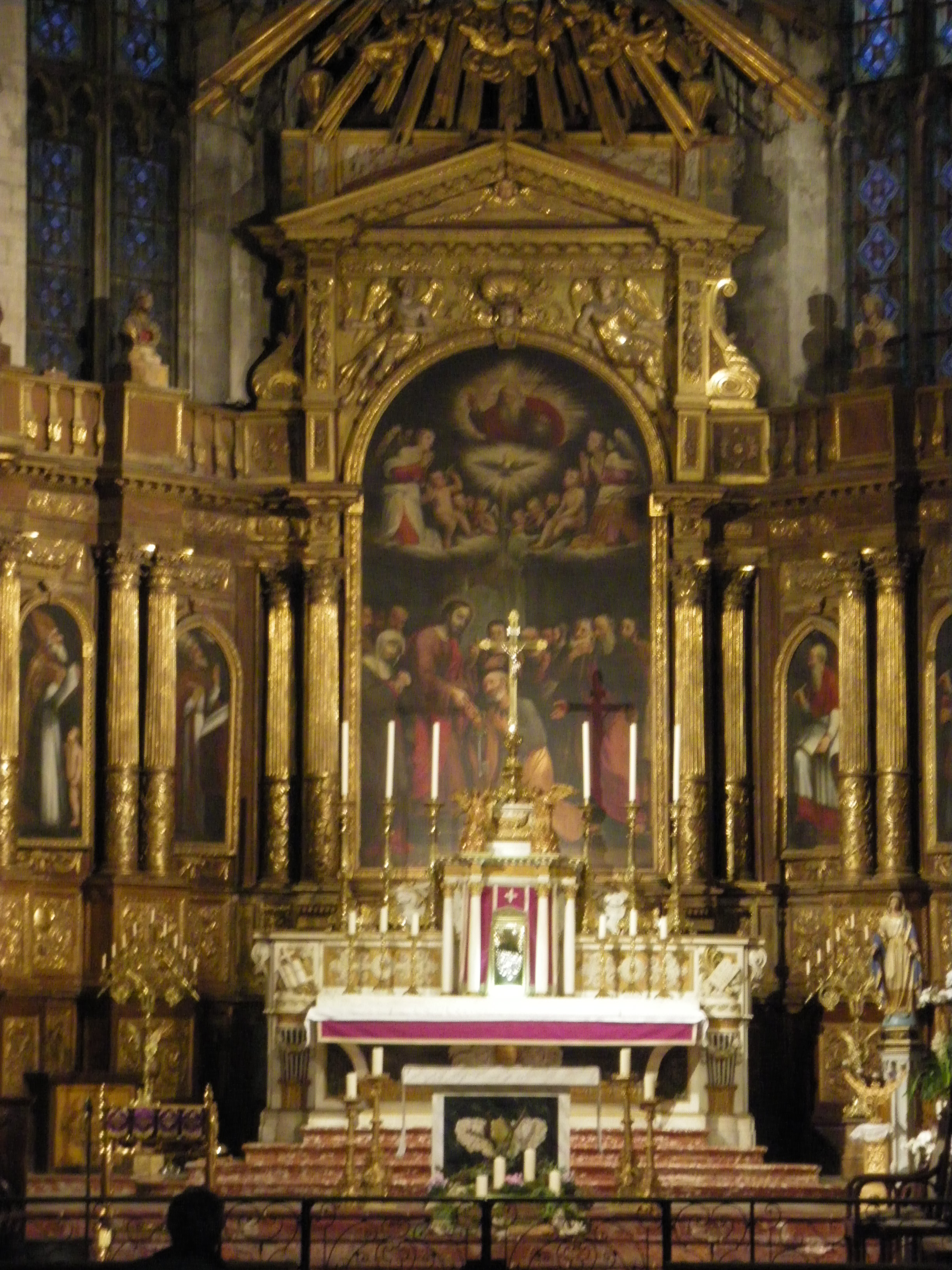 Autel de l'église Saint Pierre à Avignon